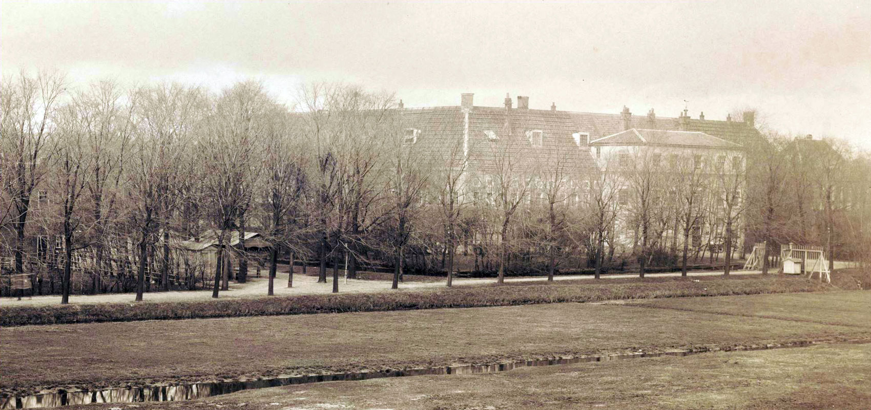 Het oude Buitengasthuis (Amsterdam)